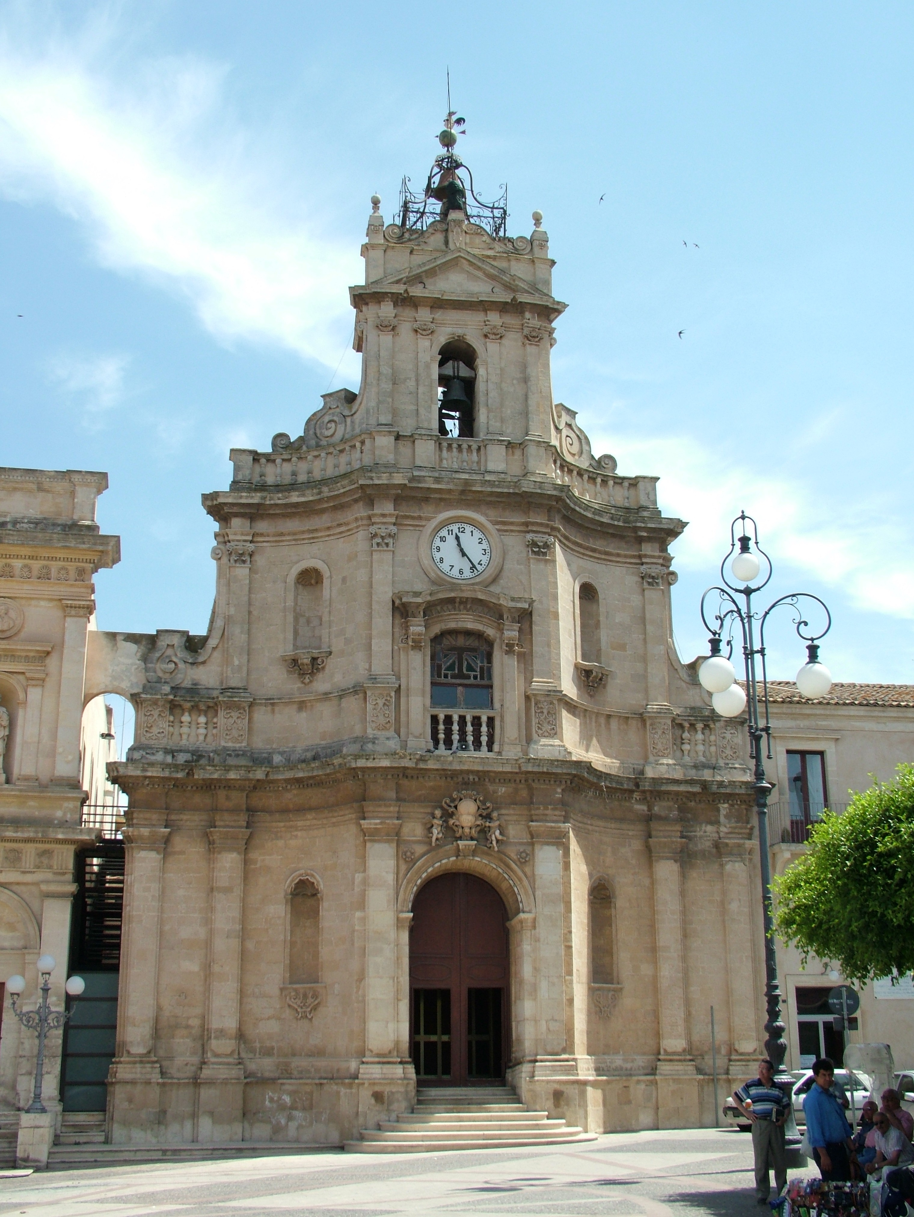 Vittoria, Chiesa_e_il_Convento_delle_Grazie, near the Teatro Comunale in Vittoria, Sicliy, Italia